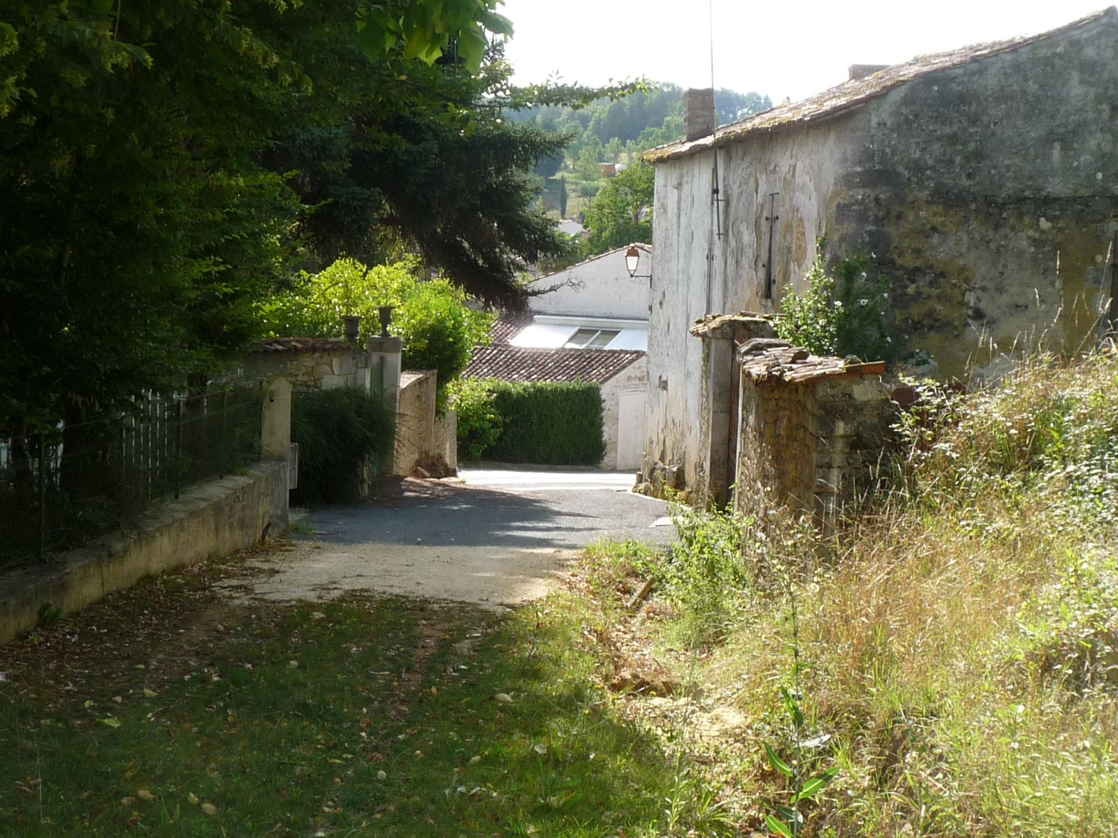 chemin de Saintes (voie d'Agrippa) arrivant à Saint-Sauvant, Charente-Maritime, France